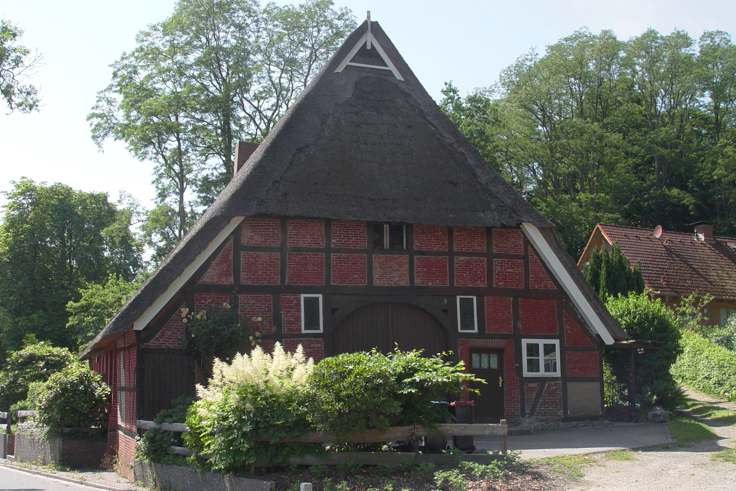 Hamburg, Bezirk Harburg, Stadtteil Eißendorf, Göhlbachtal 102, Wohnwirtschaftshaus, vermutlich von 1815This is a photograph of an architectural monument.